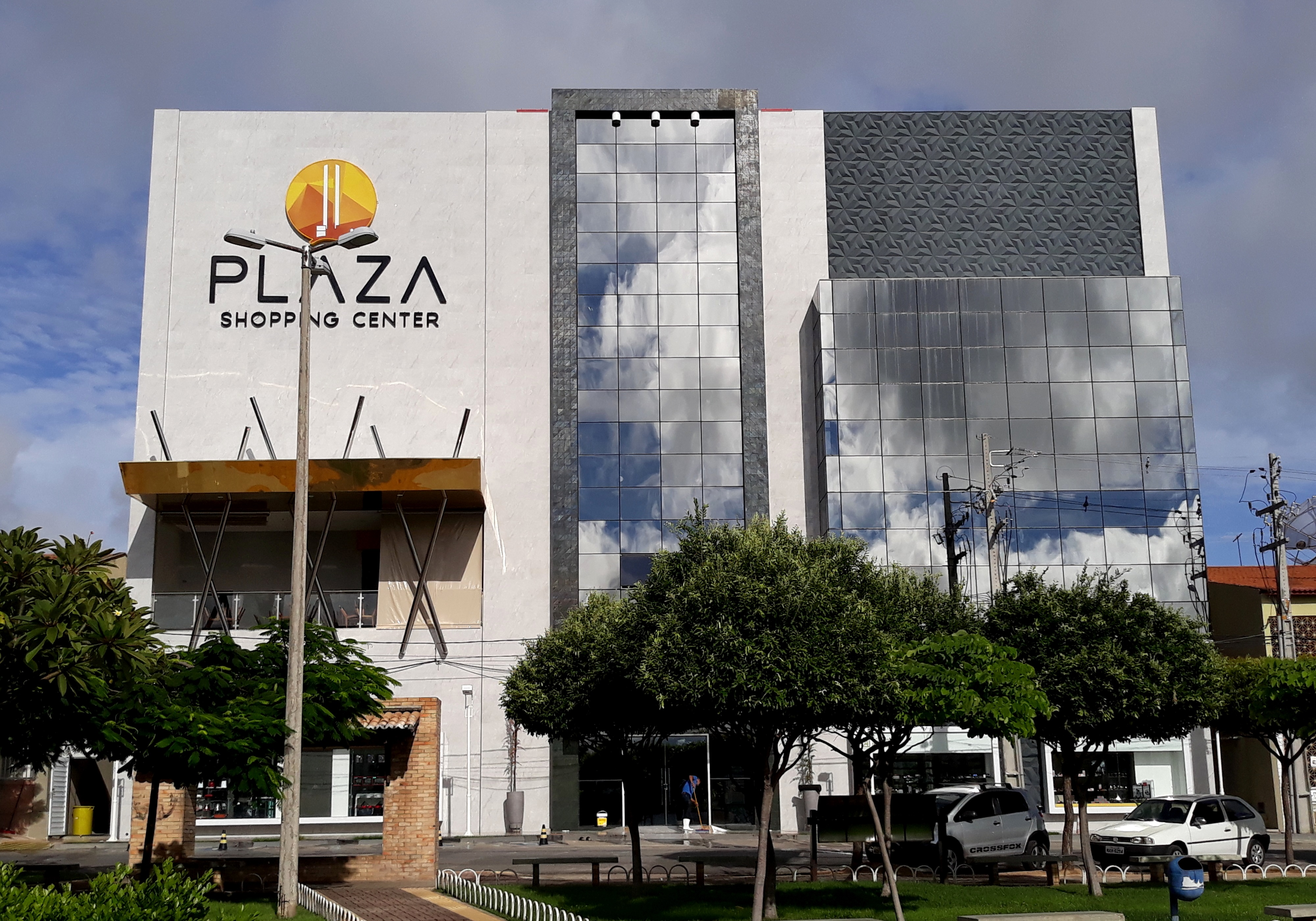 Plaza Shopping Center, recente centro comercial da cidade de Pau dos Ferros, no Rio Grande do Norte (Brasil), localizado em frente à Praça Monsenhor Caminha, no centro